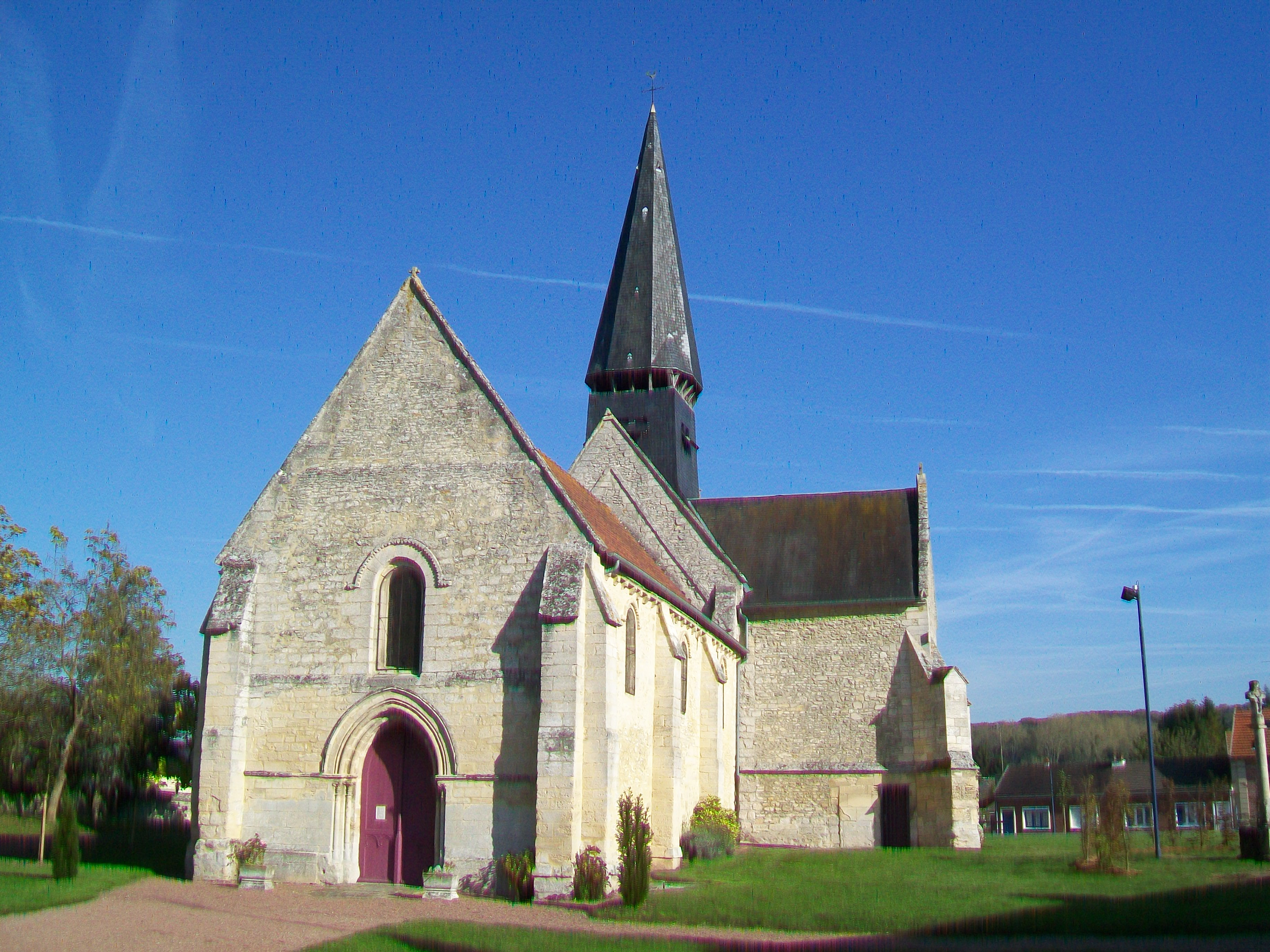 La façade occidentale.